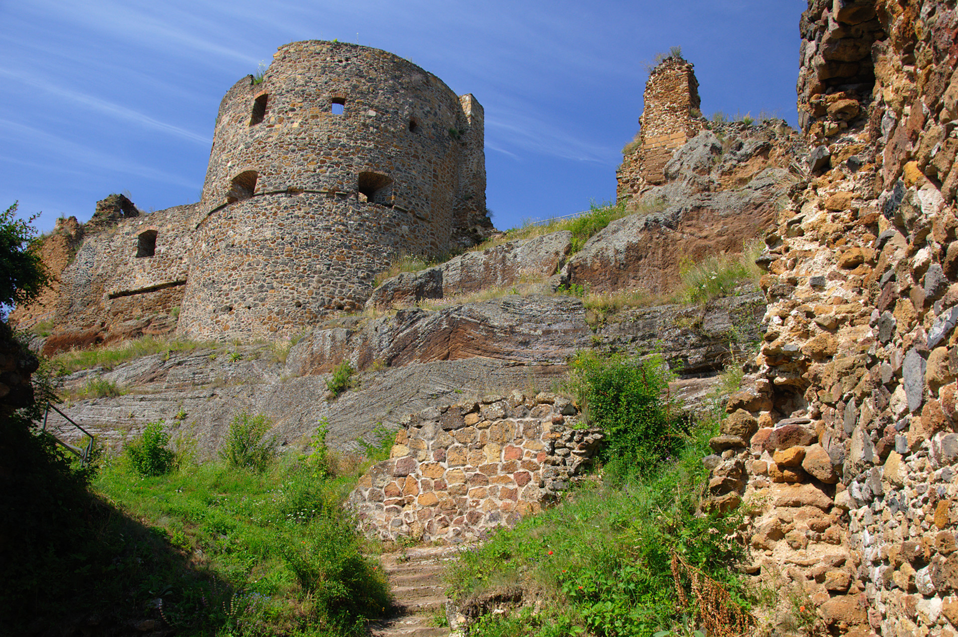 986 01 Fiľakovo, Slovakia